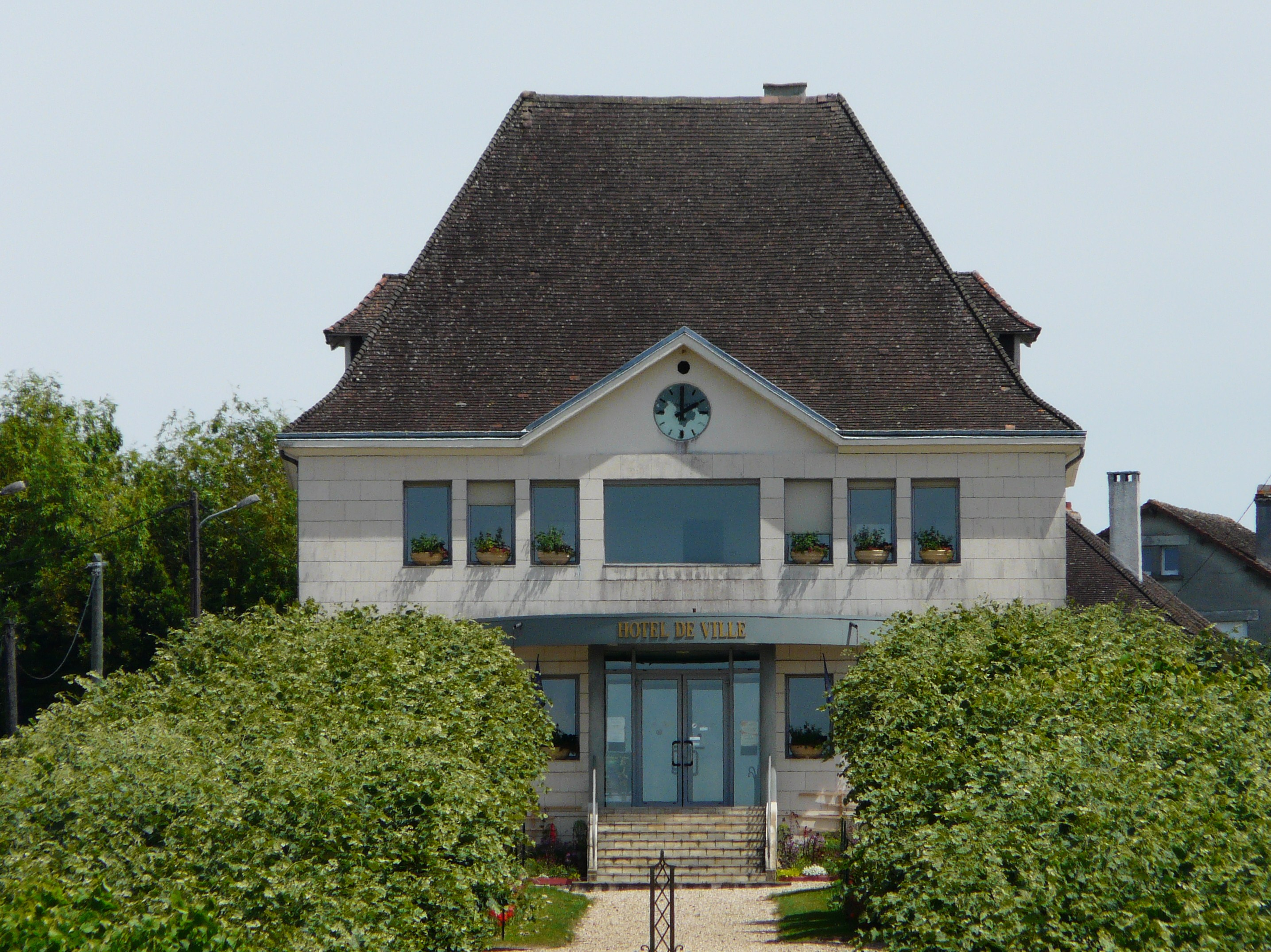 L'Hôtel de ville de Jumilhac-le-Grand, Dordogne, France.